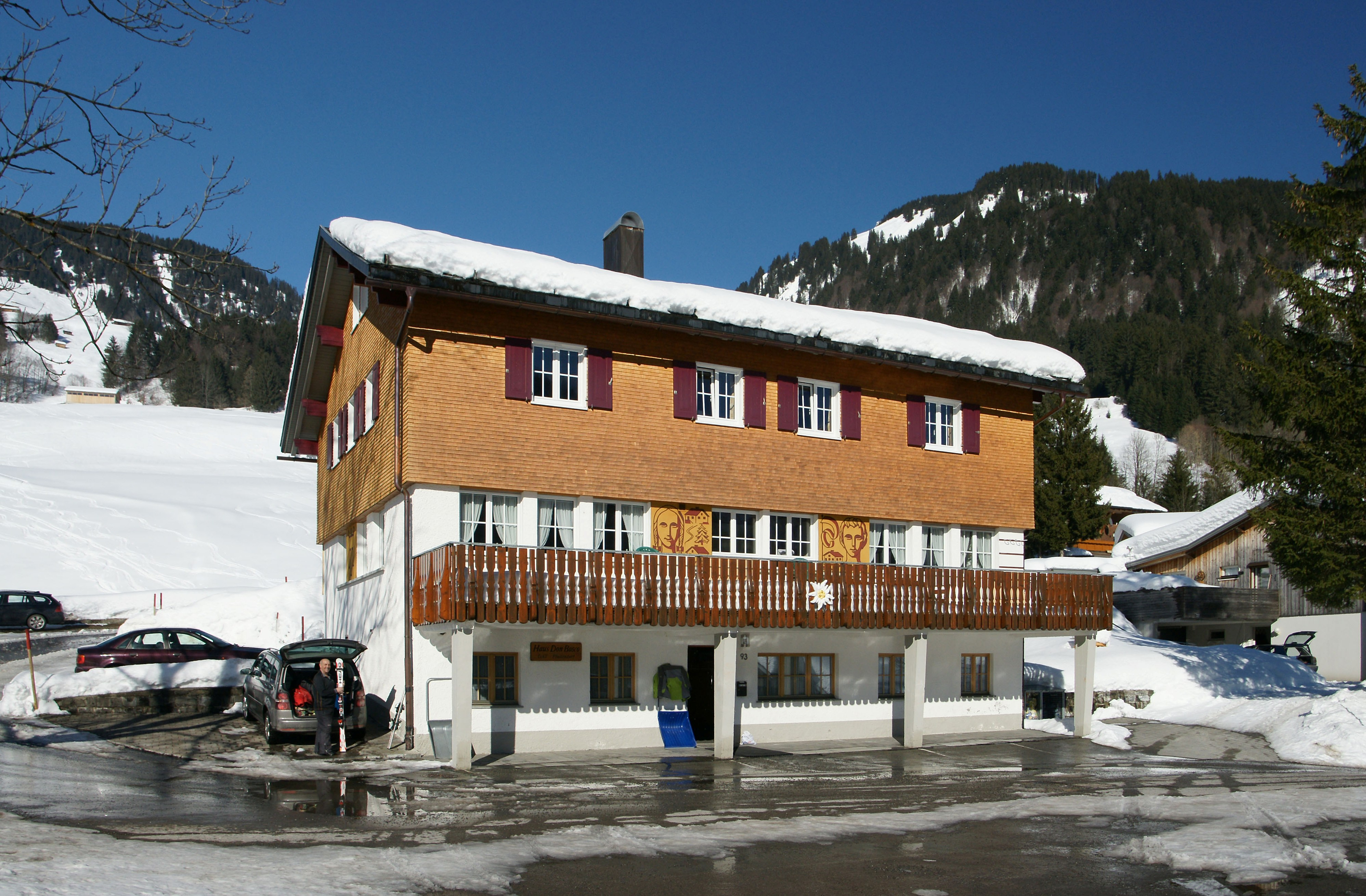 1954 wurde das Ganzjahresheim “Don Bosco” in Au Rehmen für das Vorarlberger Kinderdorf eingeweiht.